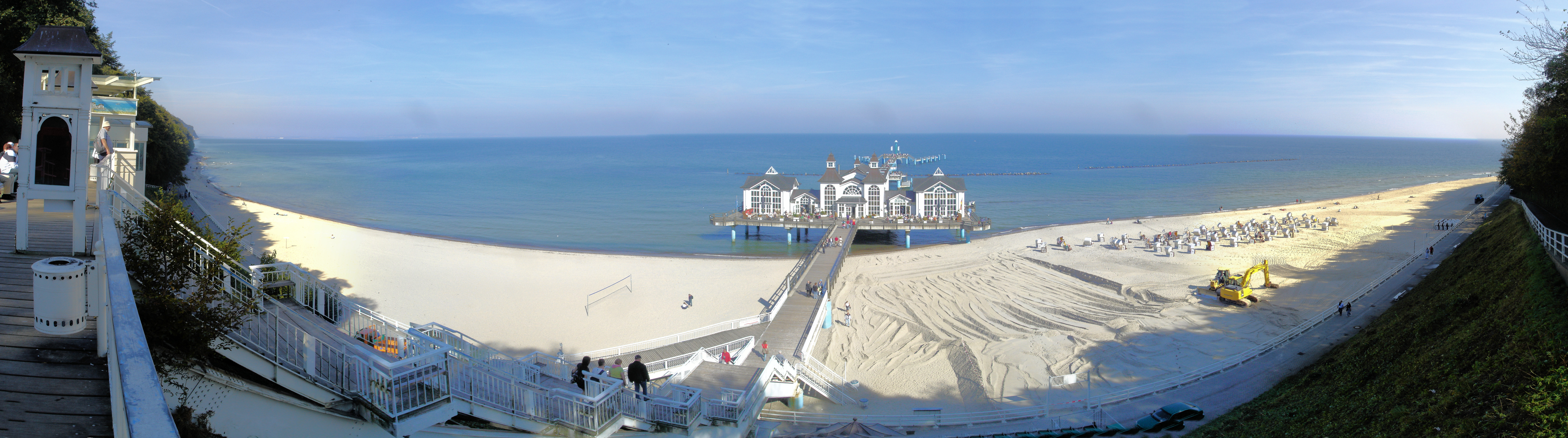 Seebrücke Sellin